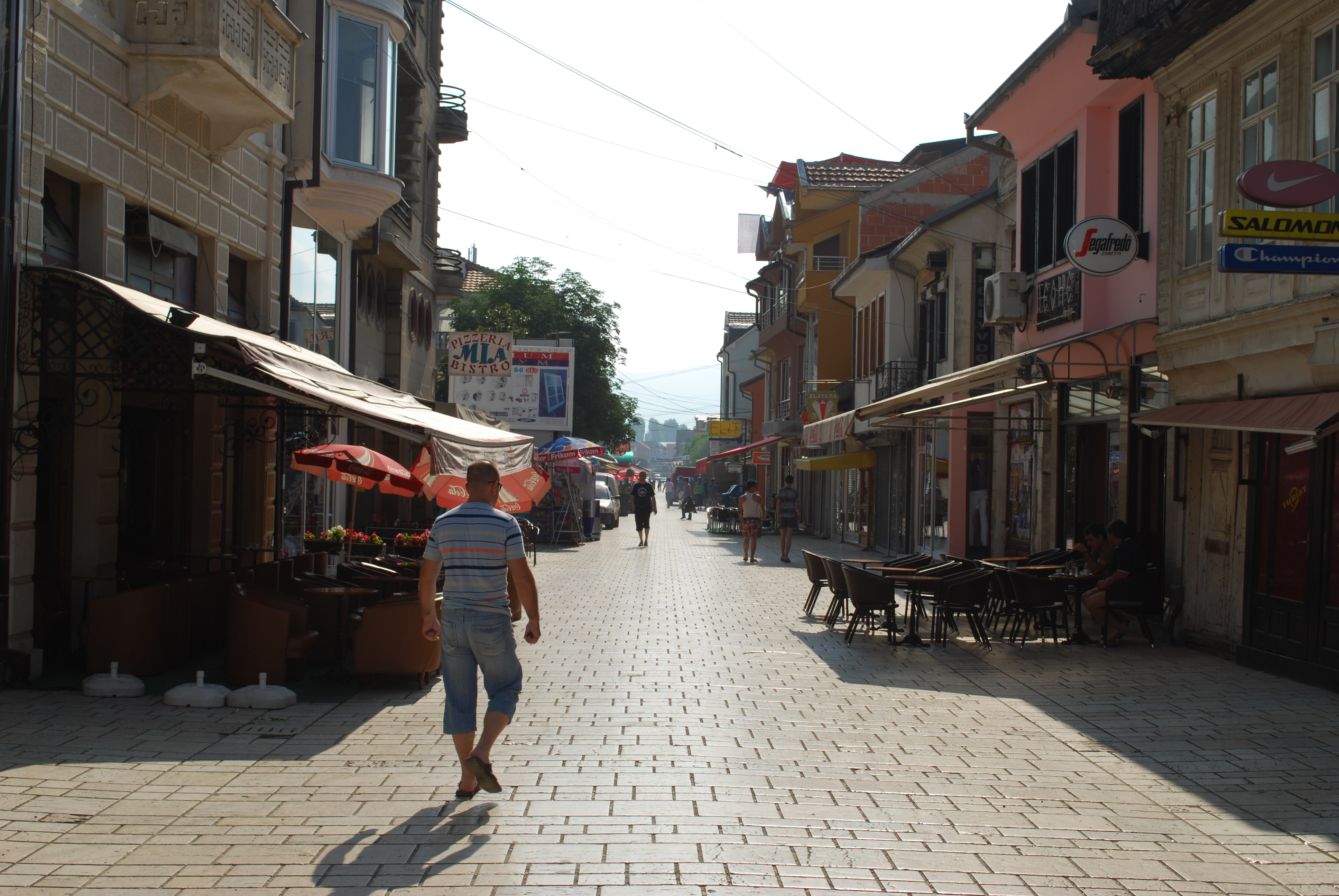 Чаршијата во Струга, Македонија